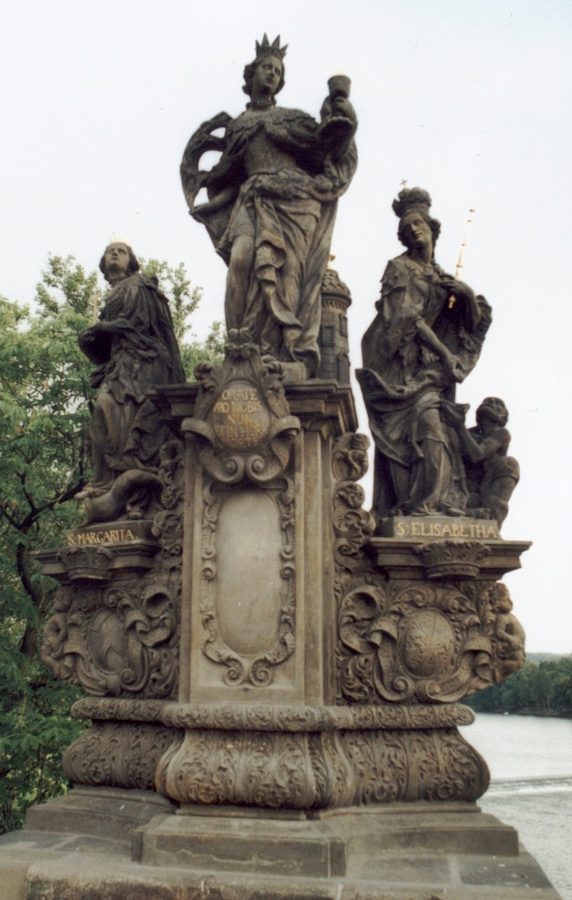 Česky: Sousoší sv. Barbory, Markéty a Alžběty v Praze na Karlově mostě, Jan Brokof, Ferdinand Brokof, 1707